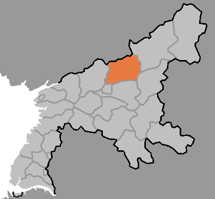 Map of Dokchon, Pyongan-namdo, DPRK, 2006